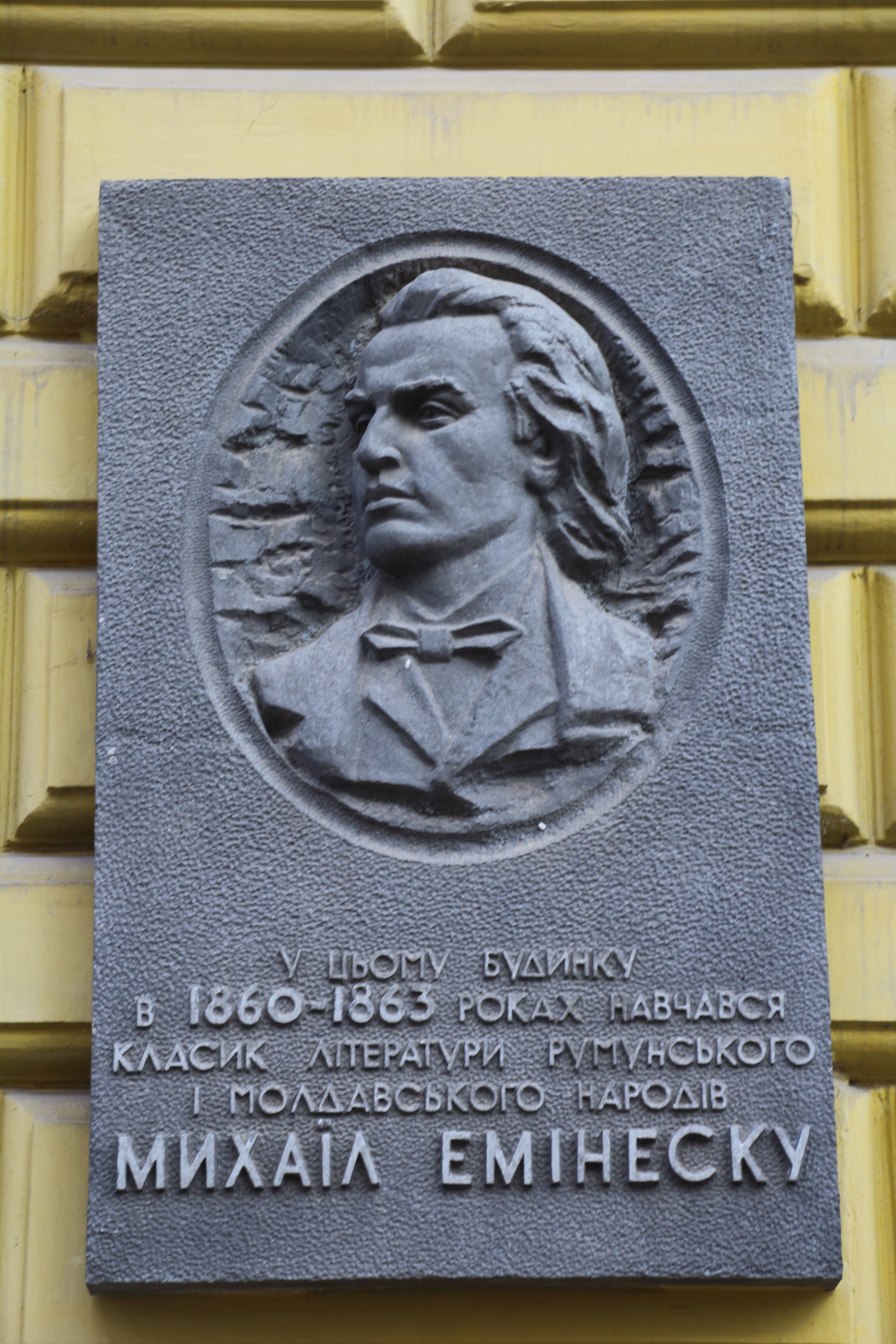 Михай Эминеску. Памятная доска в Черновцах.